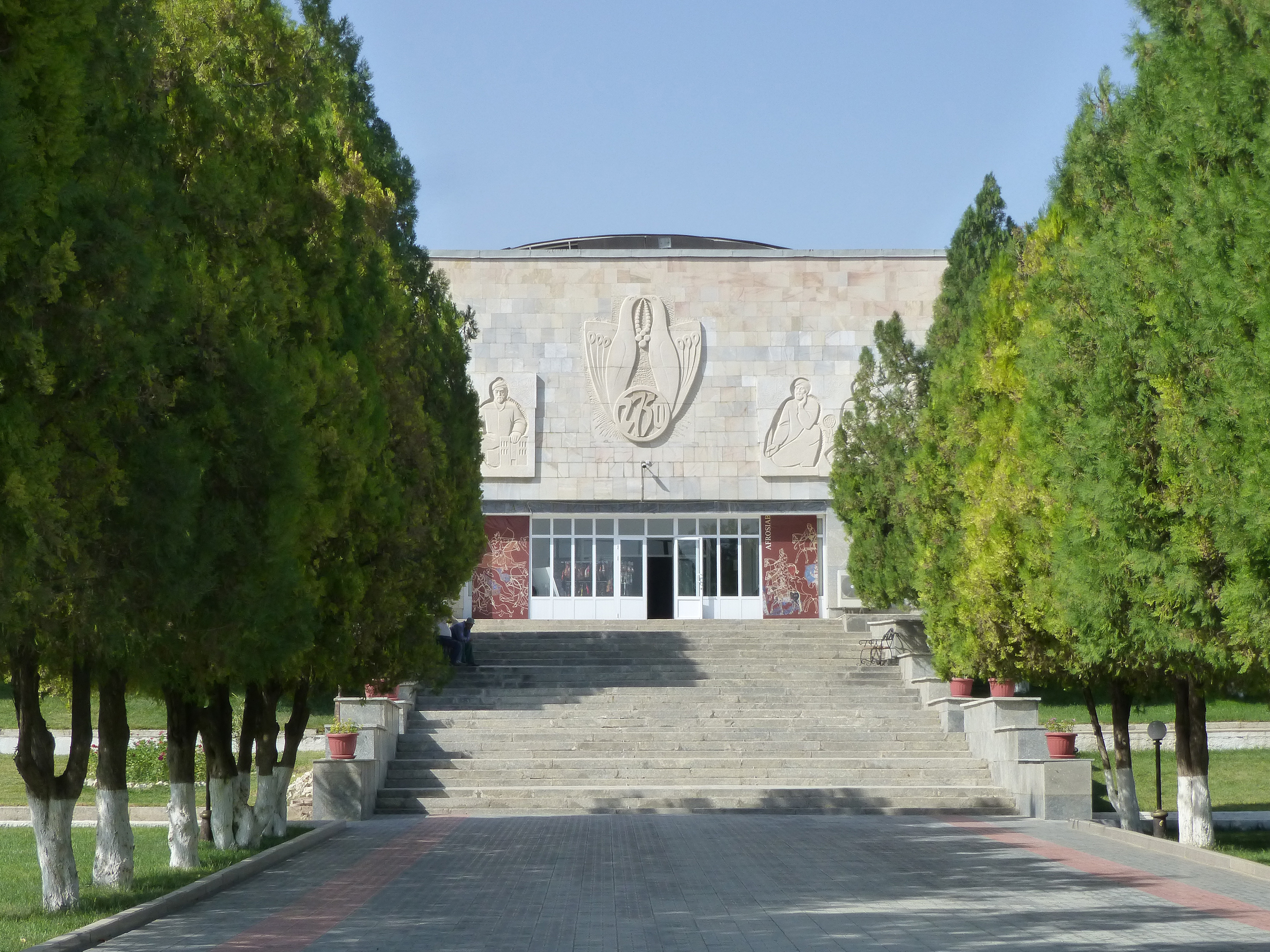 Afrasiyab Museum (Samarcande, Ouzbékistan)